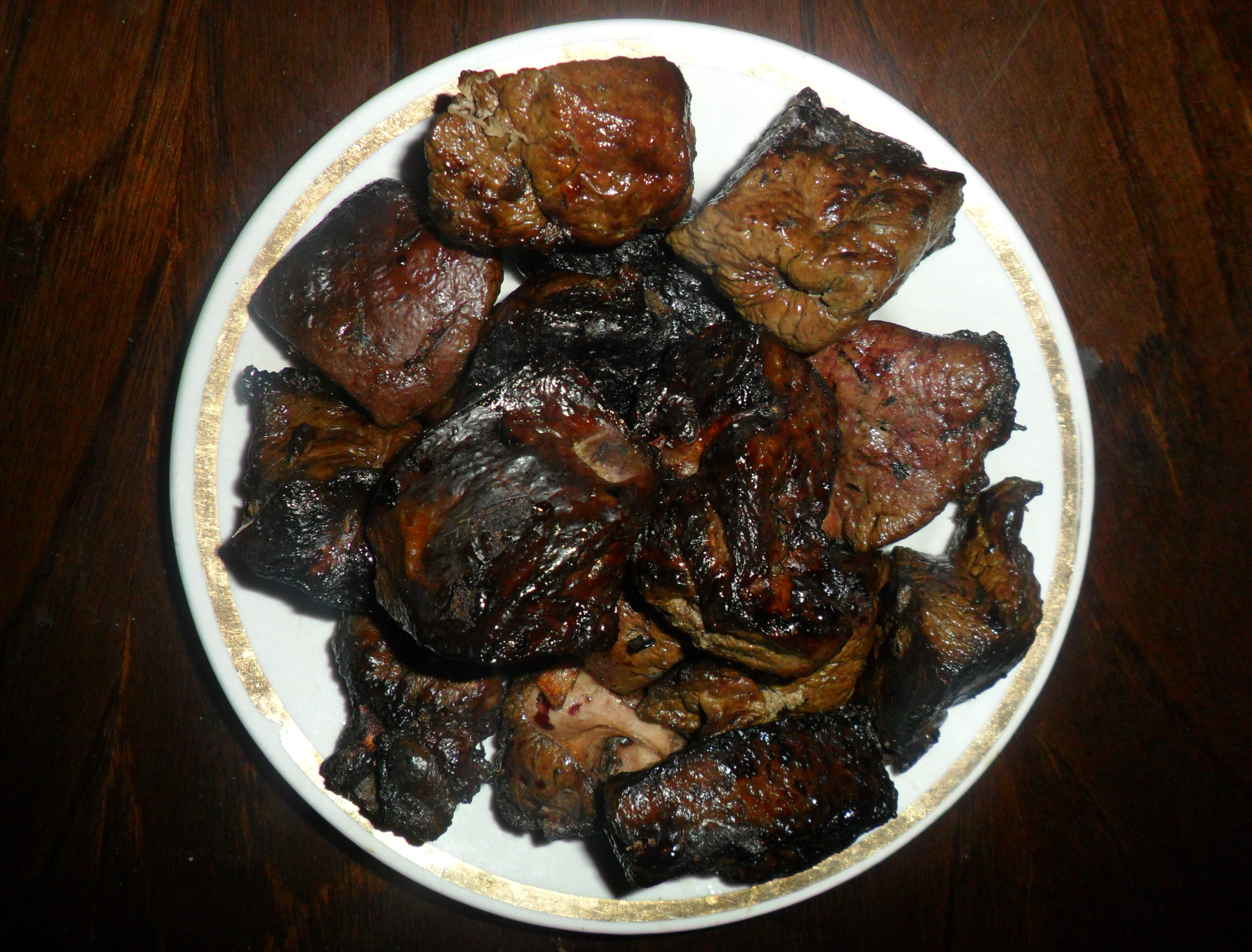 Ciyər kababı